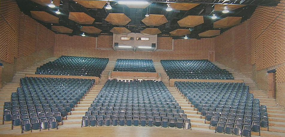 Teatro Universitario, Universidad de Antioquia, Medellín, Colombia (esta foto la tome yo, y la libero al dominio público)